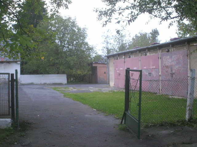 Szkolne Schronisko Młodzieżowe - garaże. W latach 1946-1990 Strażnica Wojsk Ochrony Pogranicza, a 1994-2001 Strażnica Straży Granicznej.